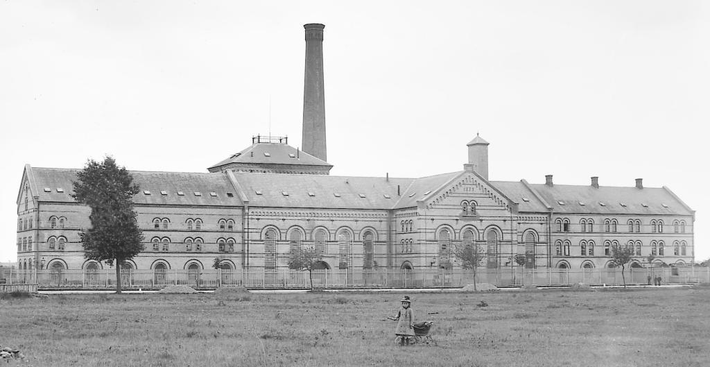 Sukkerkogeriet i Odense, opført 1872-73. Foto i Møntergården.